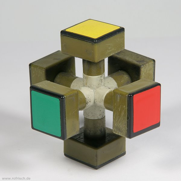 6 Mittelsteine, montiert auf dem Achsenkreuz eines Zauberwürfels